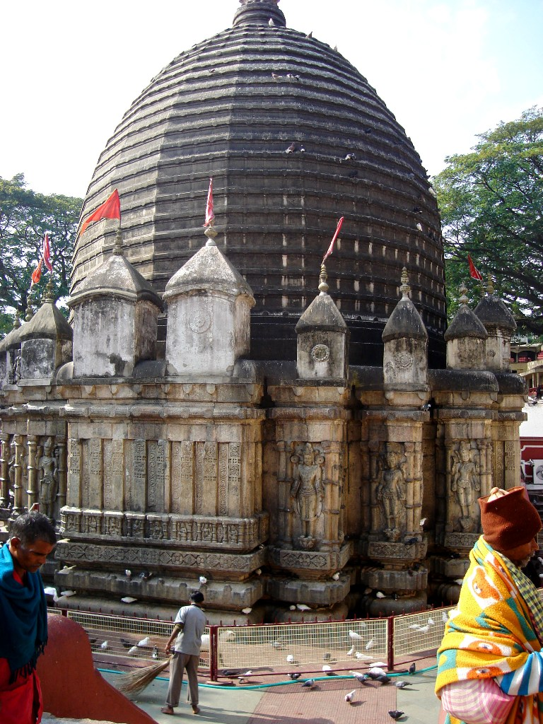 Kamakhaya Temple, Guwahati, Assam, India.